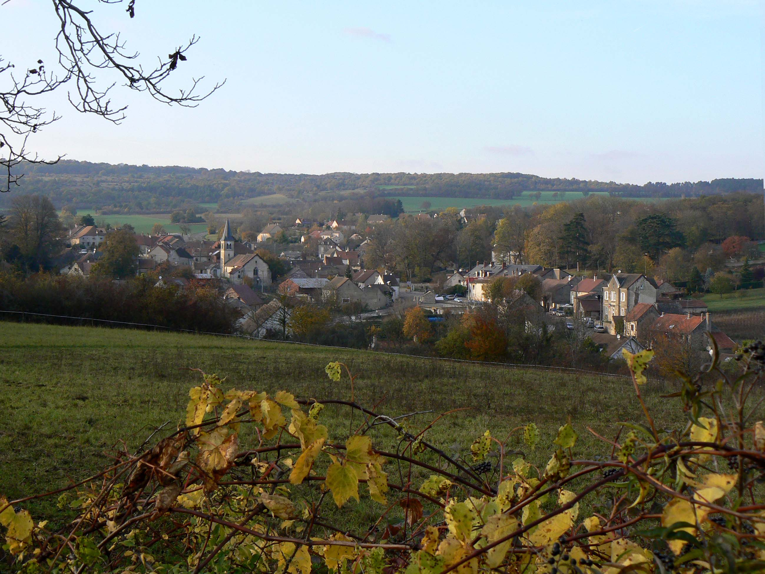 Bouze-lès-Beaune